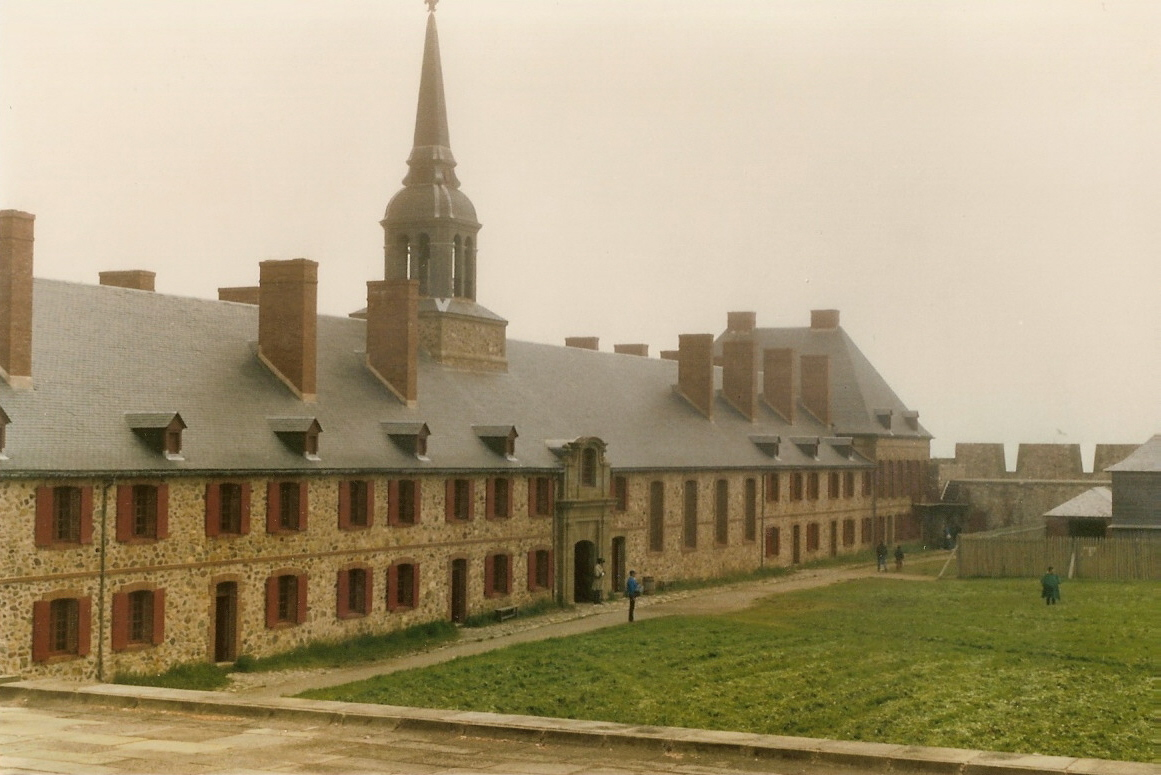 Bastion du Roi